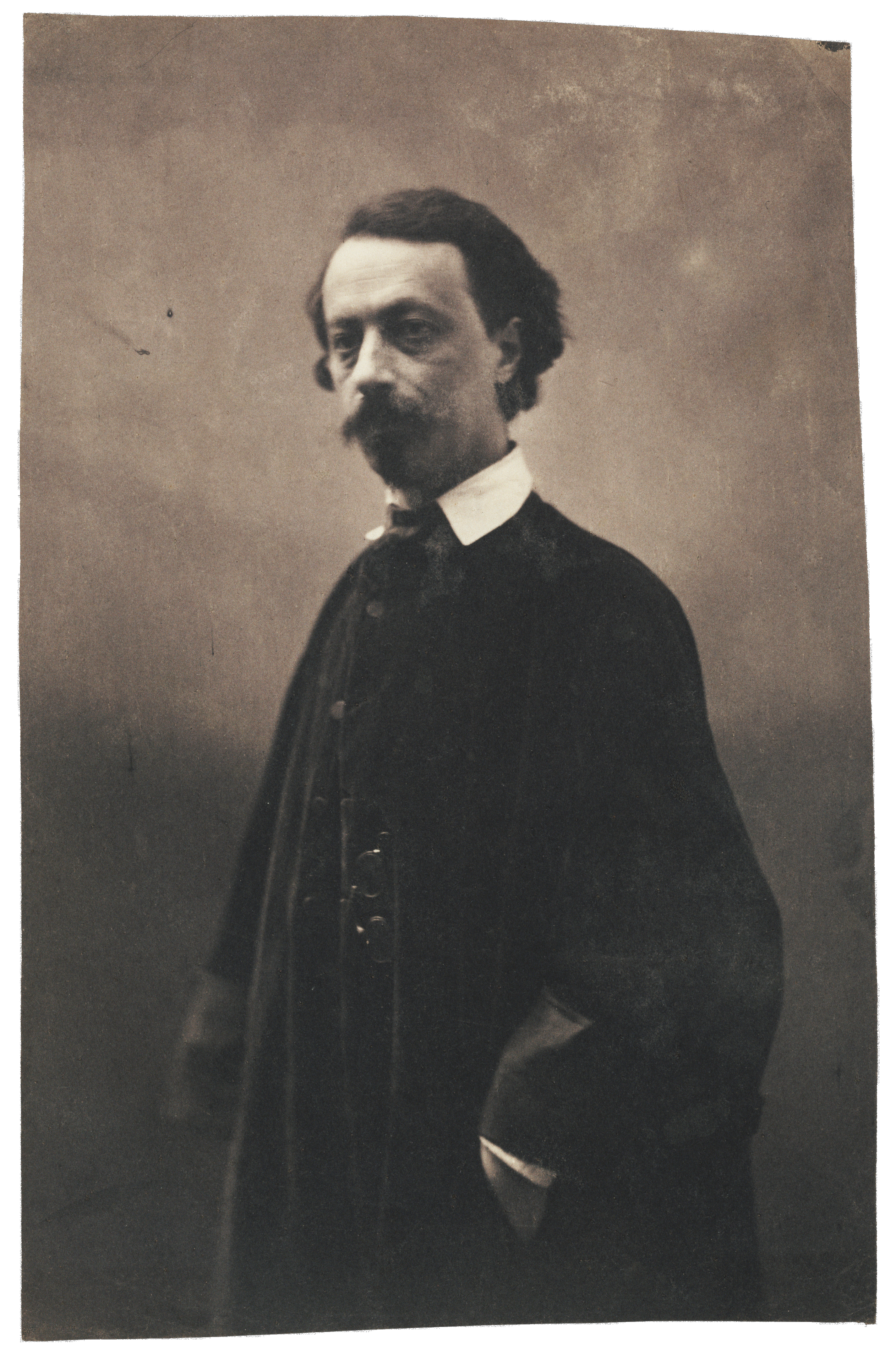 Salt print of Jules de Prémaray